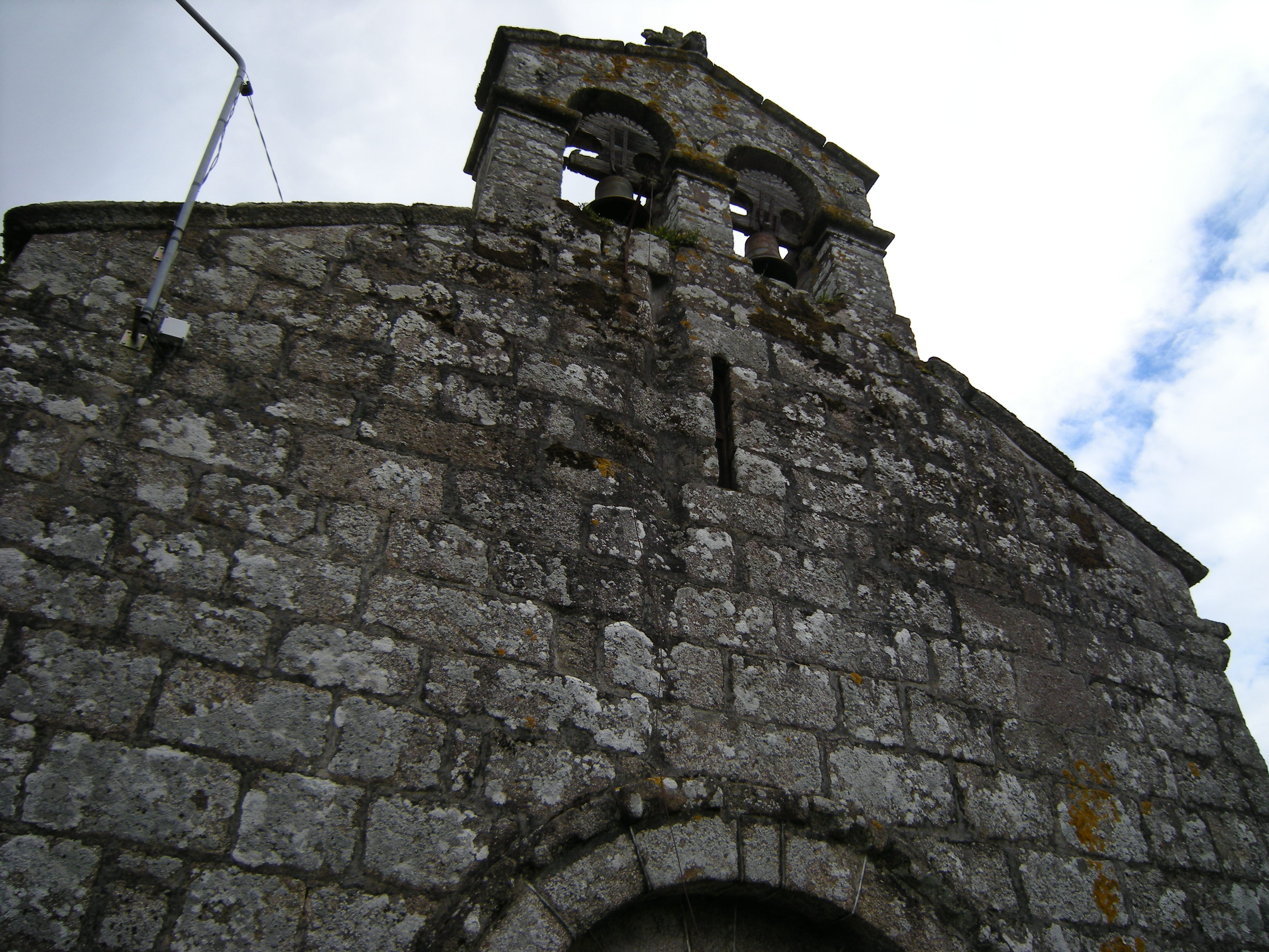 Igrexa de Santo Estevo de Pezobrés, Santiso